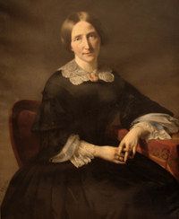 portret van Catharina Julia Roeters van Lennep (1813-1883)